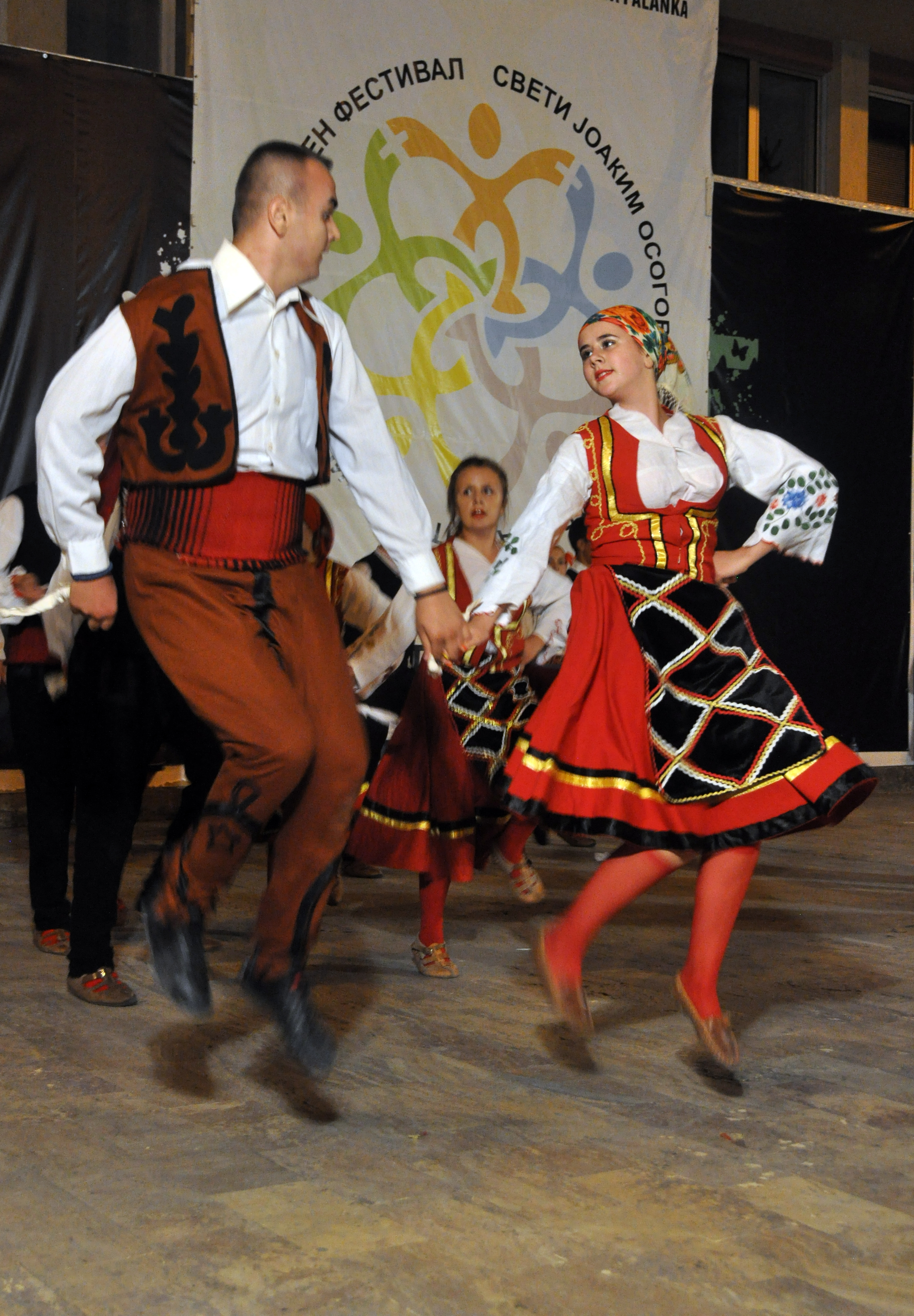 Фолклорен фестивал „Свети Јоаким Осоговски“ Крива Паланка